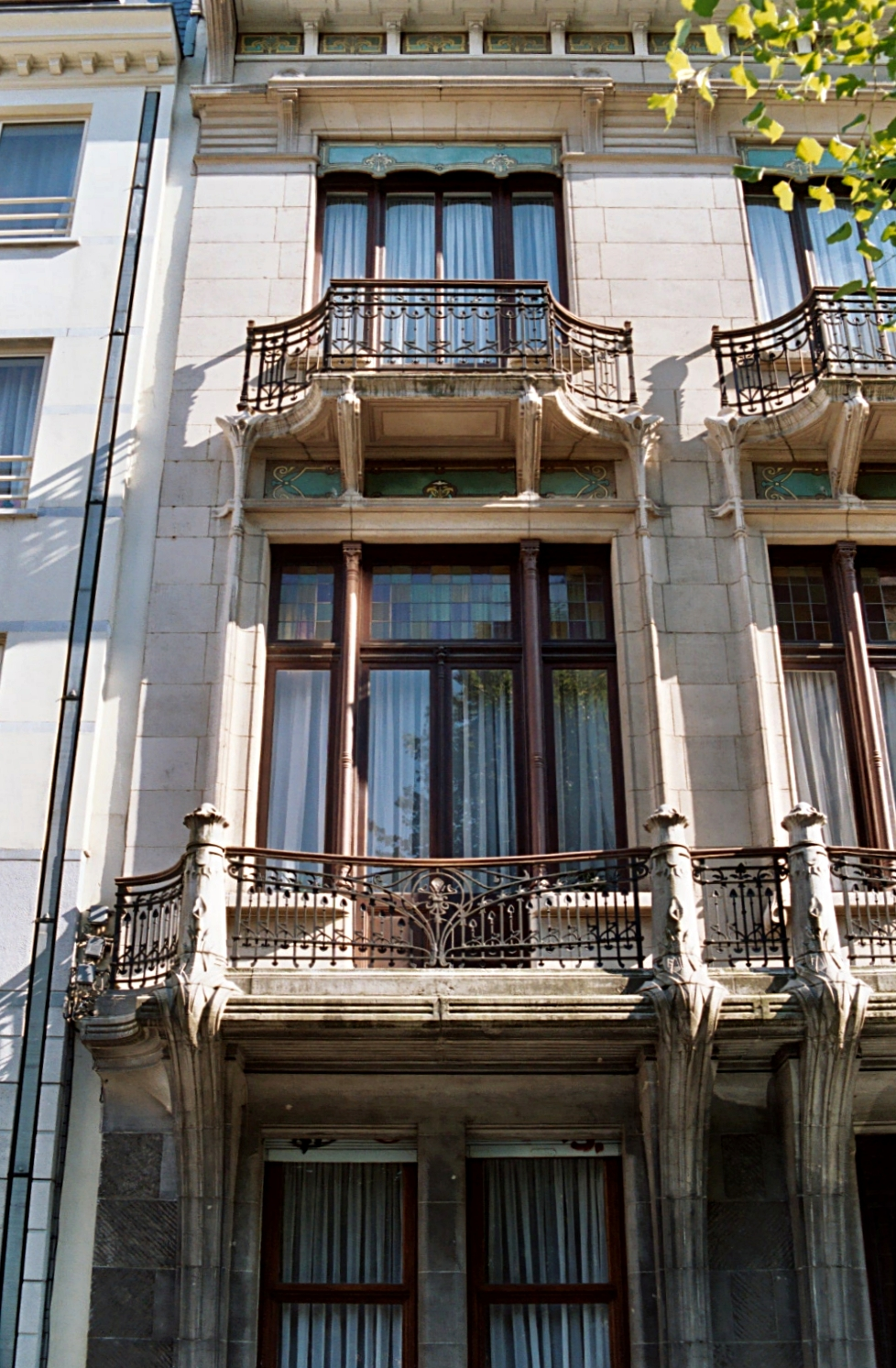 Henri Jacobs, hôtel du baron Buffin, rue Caroly n°19 à Bruxelles (Art nouveau)